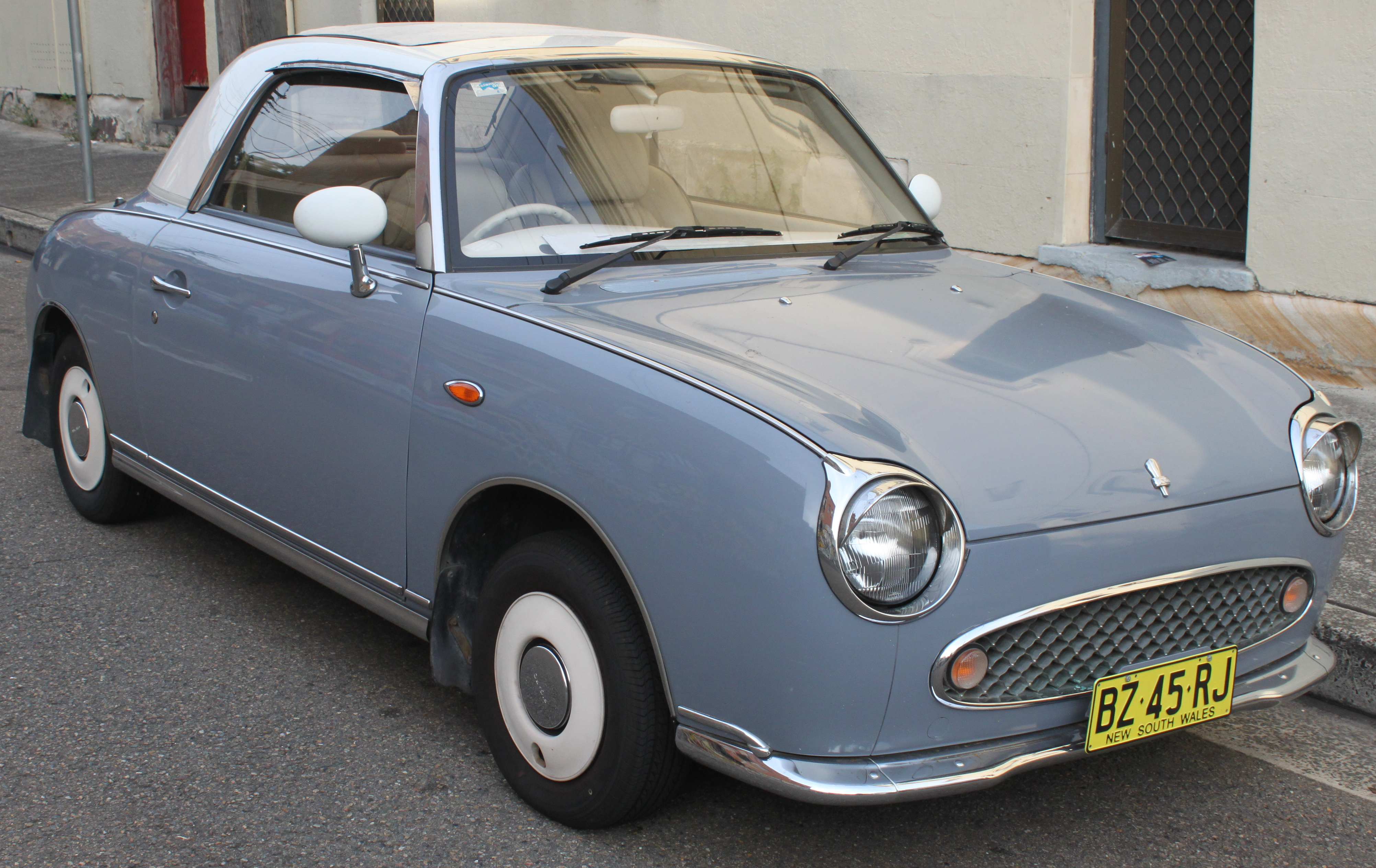 Nissan Figaro E-FK10